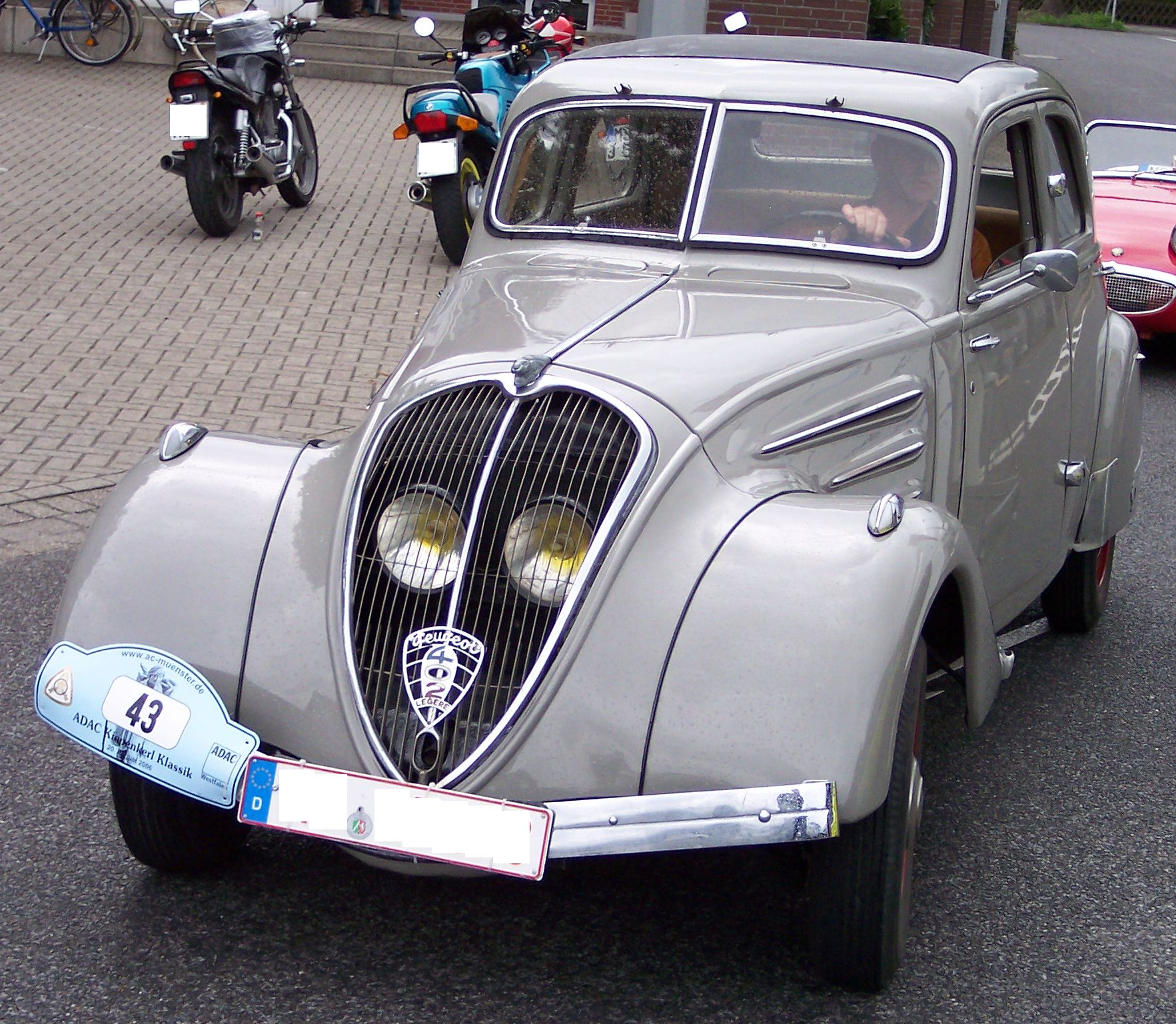 Peugeot 402 Légère.